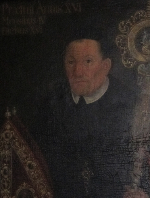 Coelestin Höynck, Abt Kloster Grafschaft (1711-1727) gemalt 1742 von Dehne, Dillenburg